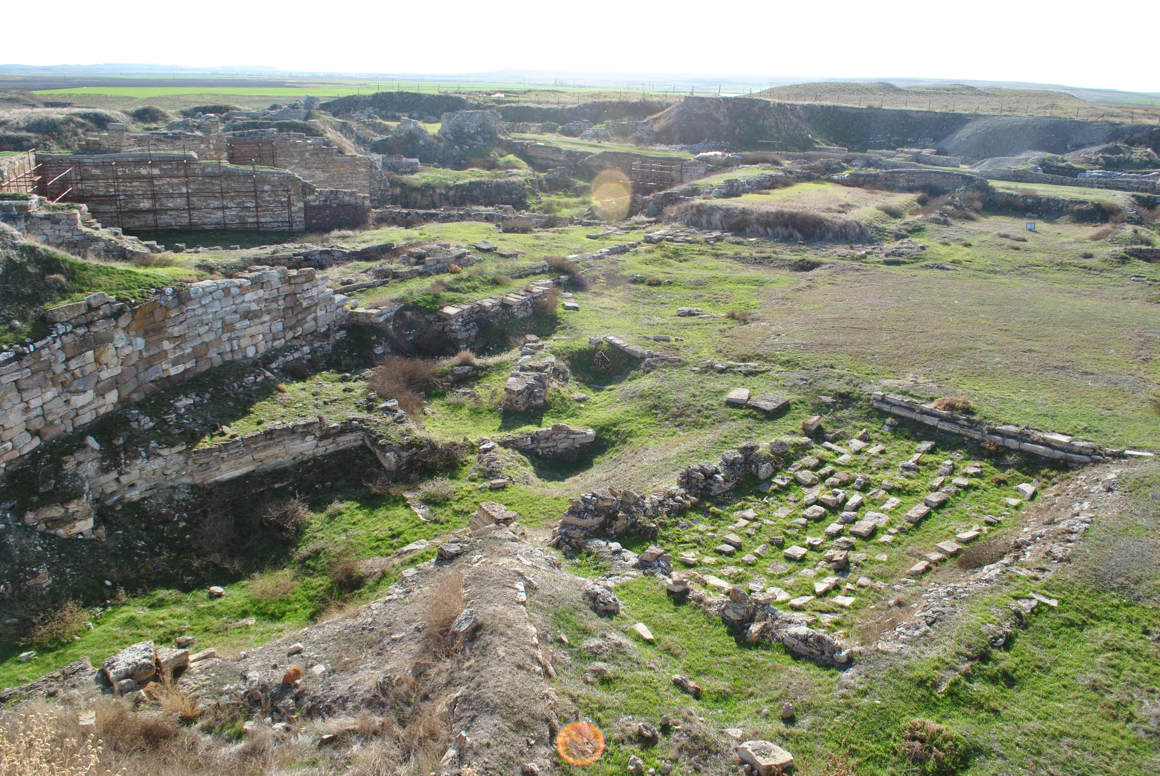 Gordion kalesi ve kazı alanı